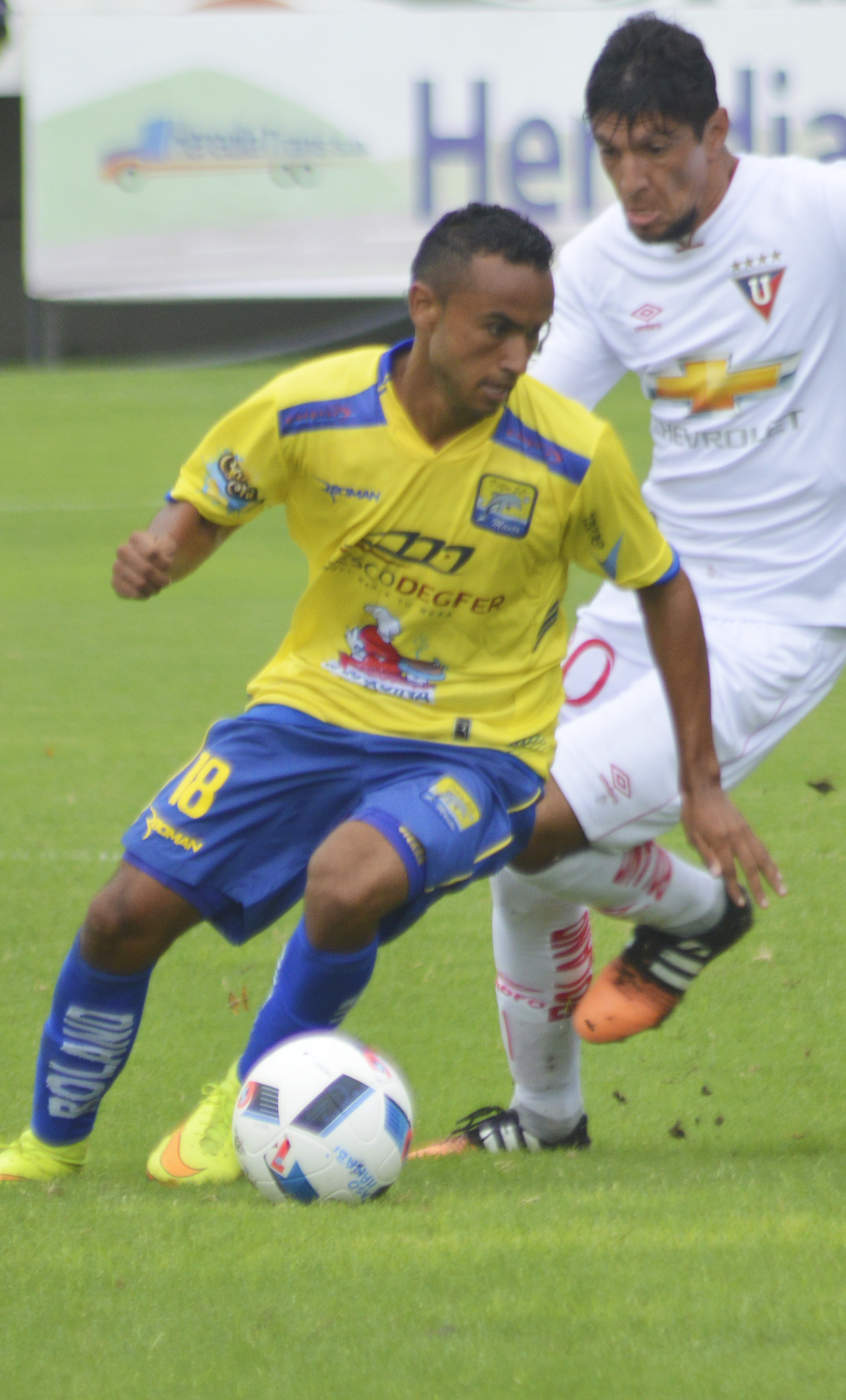 Jorda Sierra en Delfín 2016